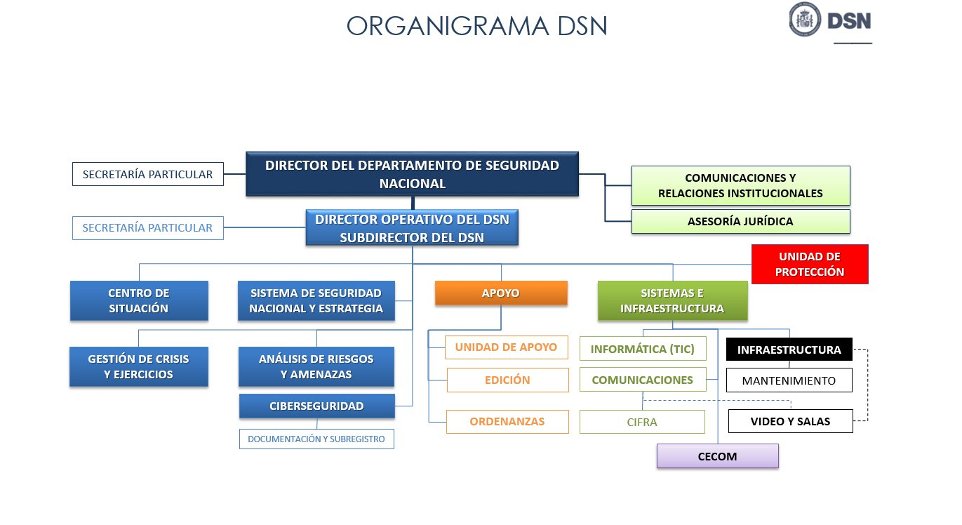 Organigrama Departamento de Seguridad Nacional España DSN